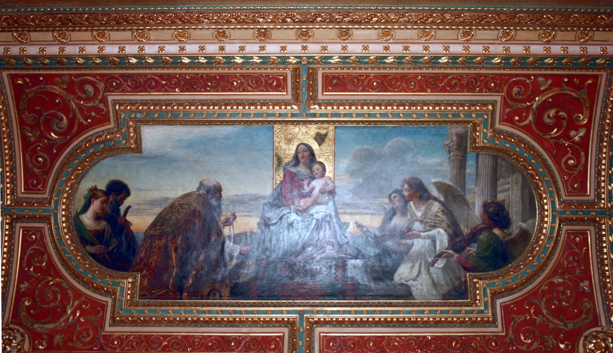 Bogoštovlje, rad Ivan Tišov u Hrvatskom institutu za povijest u Zagrebu